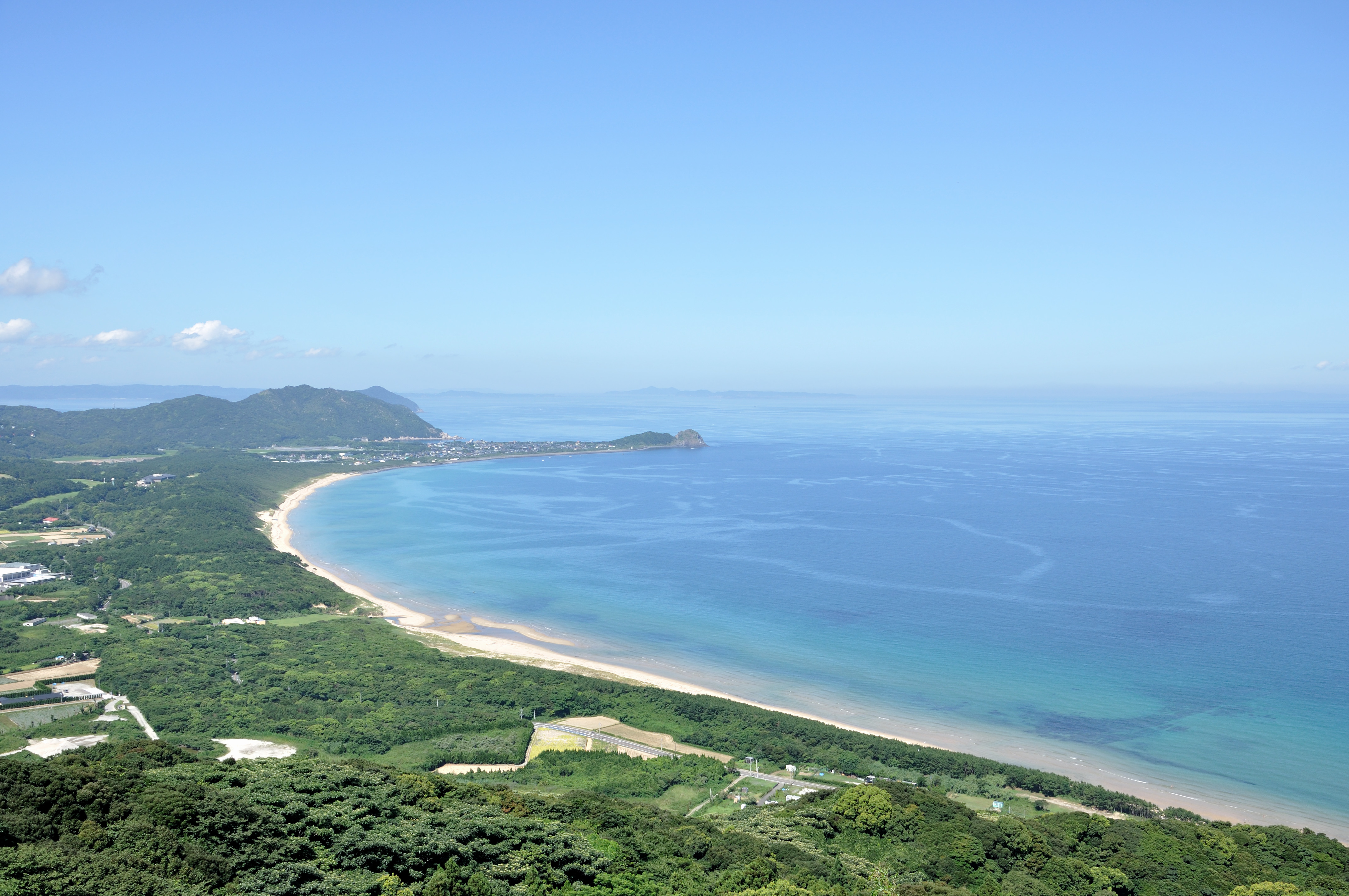 美しい野北海岸